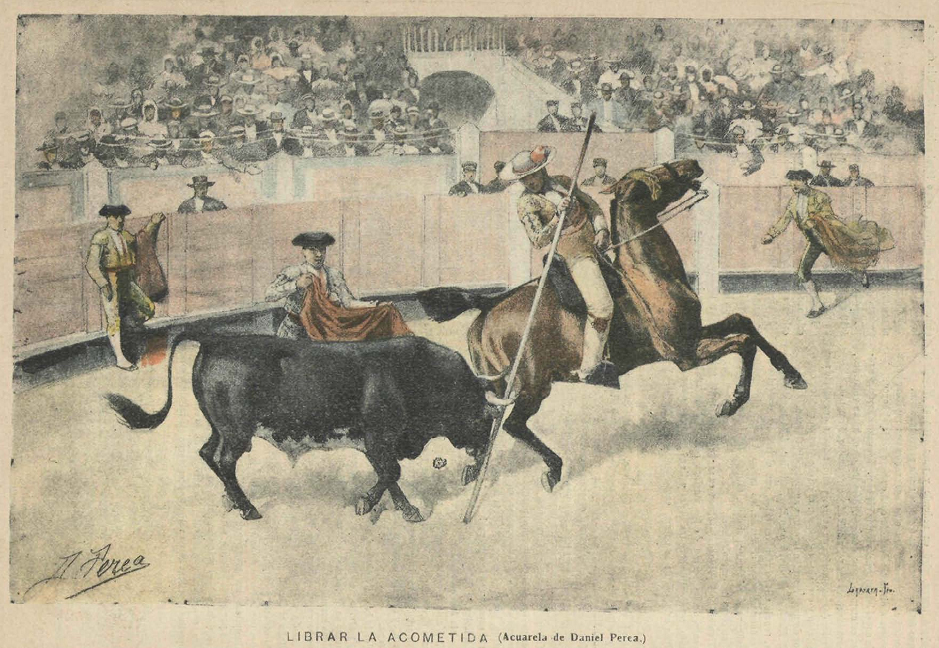 Librar la acometida, acuarela de Daniel Perea y Rojas, en la revista La Lidia.